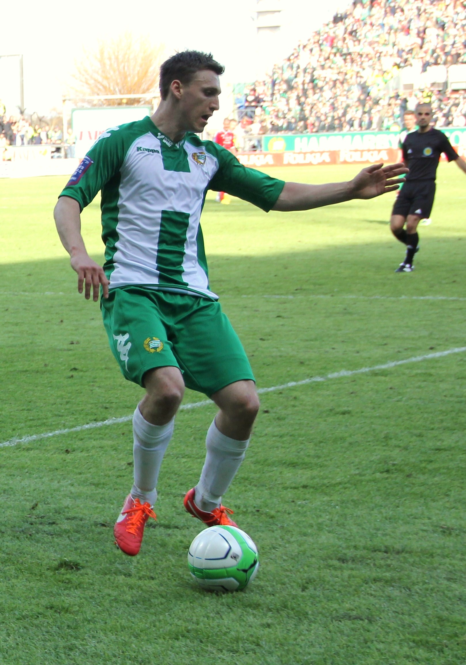 Hammarbys Billy Schuler.